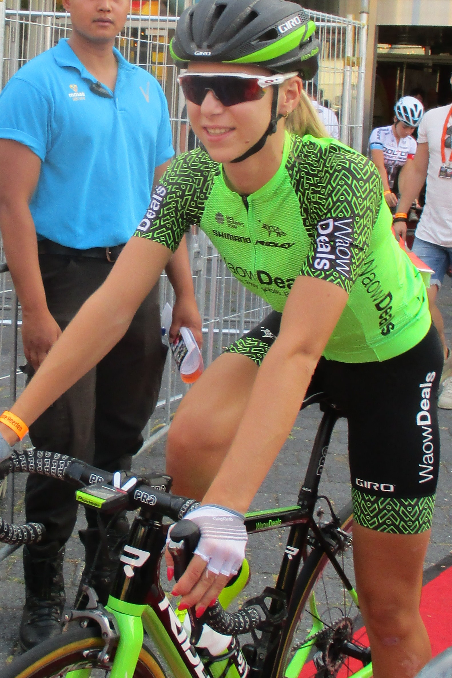 Criterium RaboRonde in Heerlen, Limburg, vrijdag 3 augustus 2018